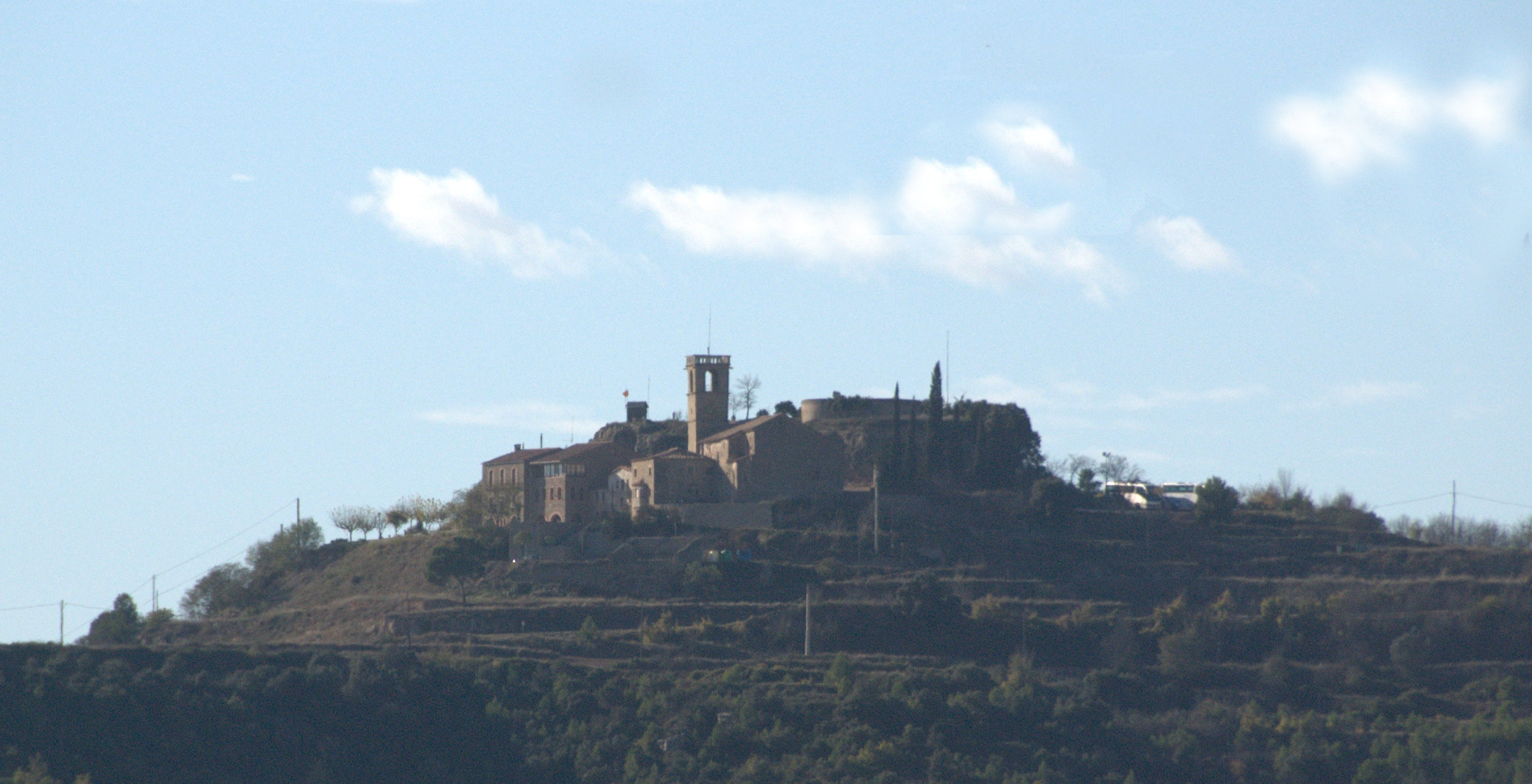 Vista del nucli de Castelladral, on destaca el campanar de l'Església de Sant Miquel